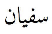 Суфьян